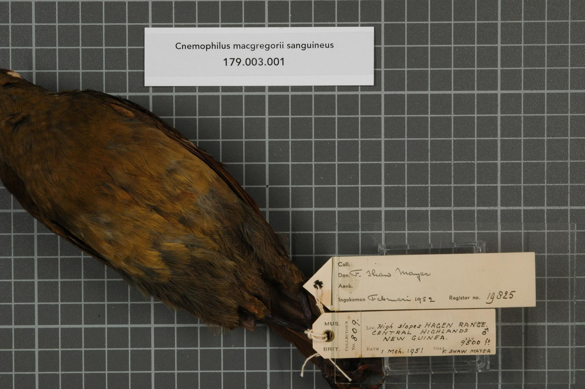 Cnemophilus macgregorii sanguineus Iredale, 1948